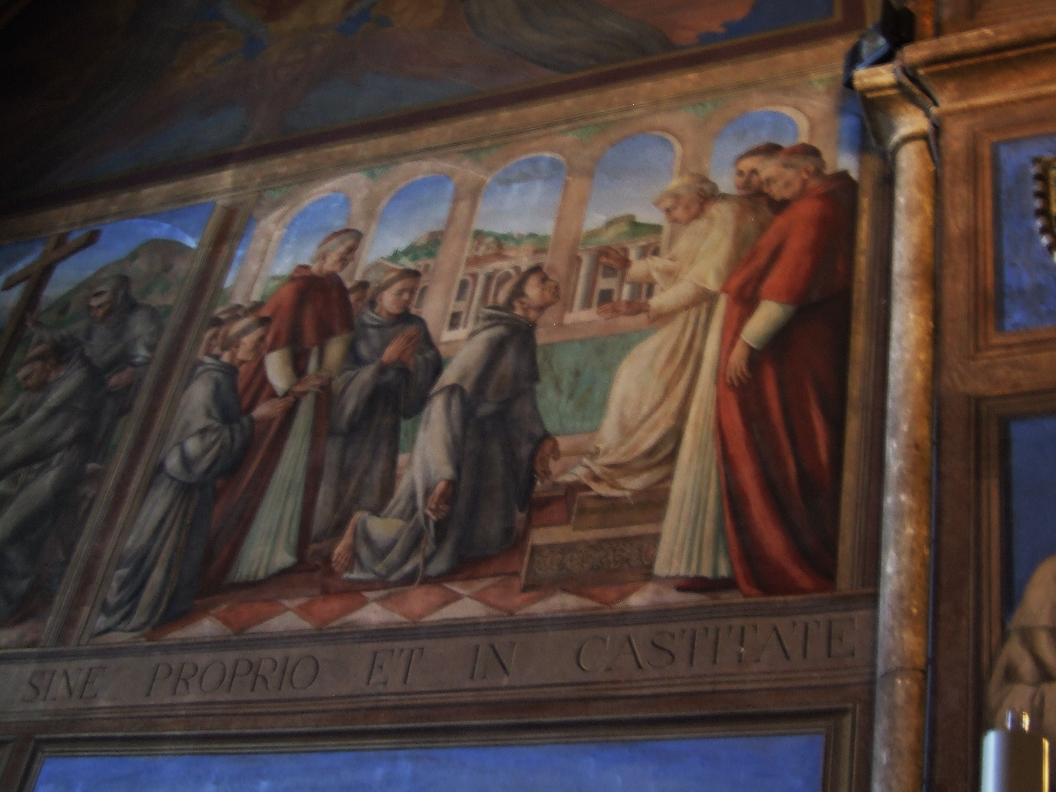 Padova - Sant'Antonio - Cappella San Francesco, presbiterio, seconda cappella a sinistra